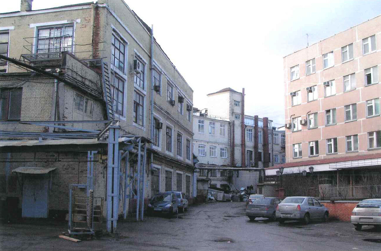 Архивное фото